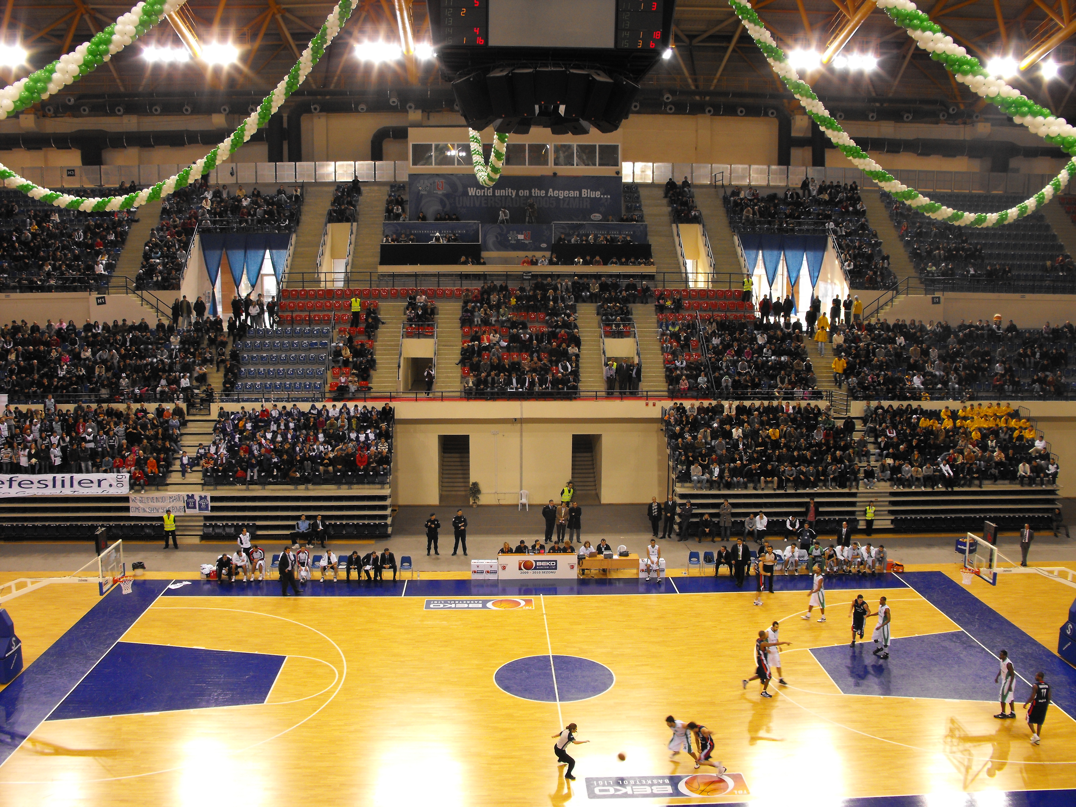 İzmir Halkapınar Spor Salonu Bornova Belediye-Efes Pilsen maçı sırasında